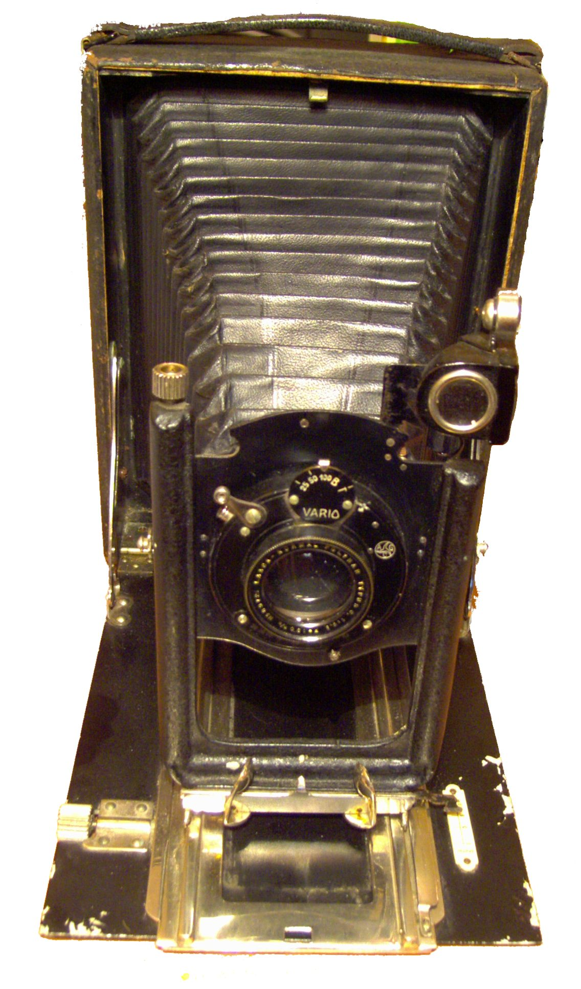 Selbst aufgenommen, gemeinfrei